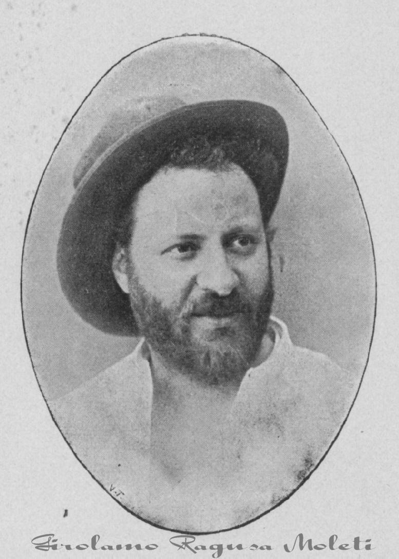 Riproduzione foto di Girolamo Ragusa Moleti 1900, collezione Frontini